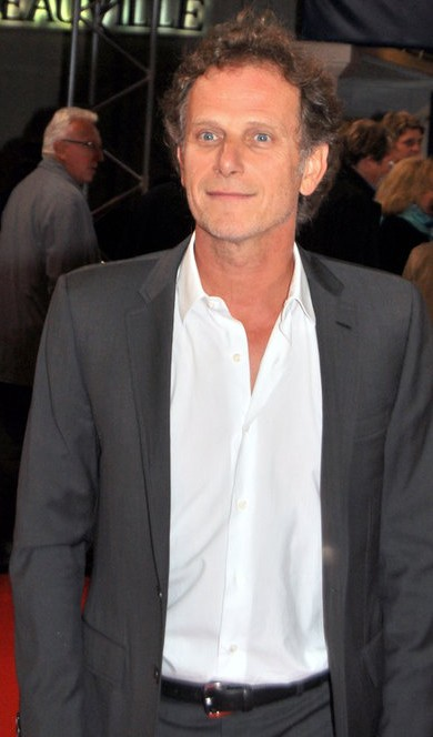 Charles Berling au festival de Deauville